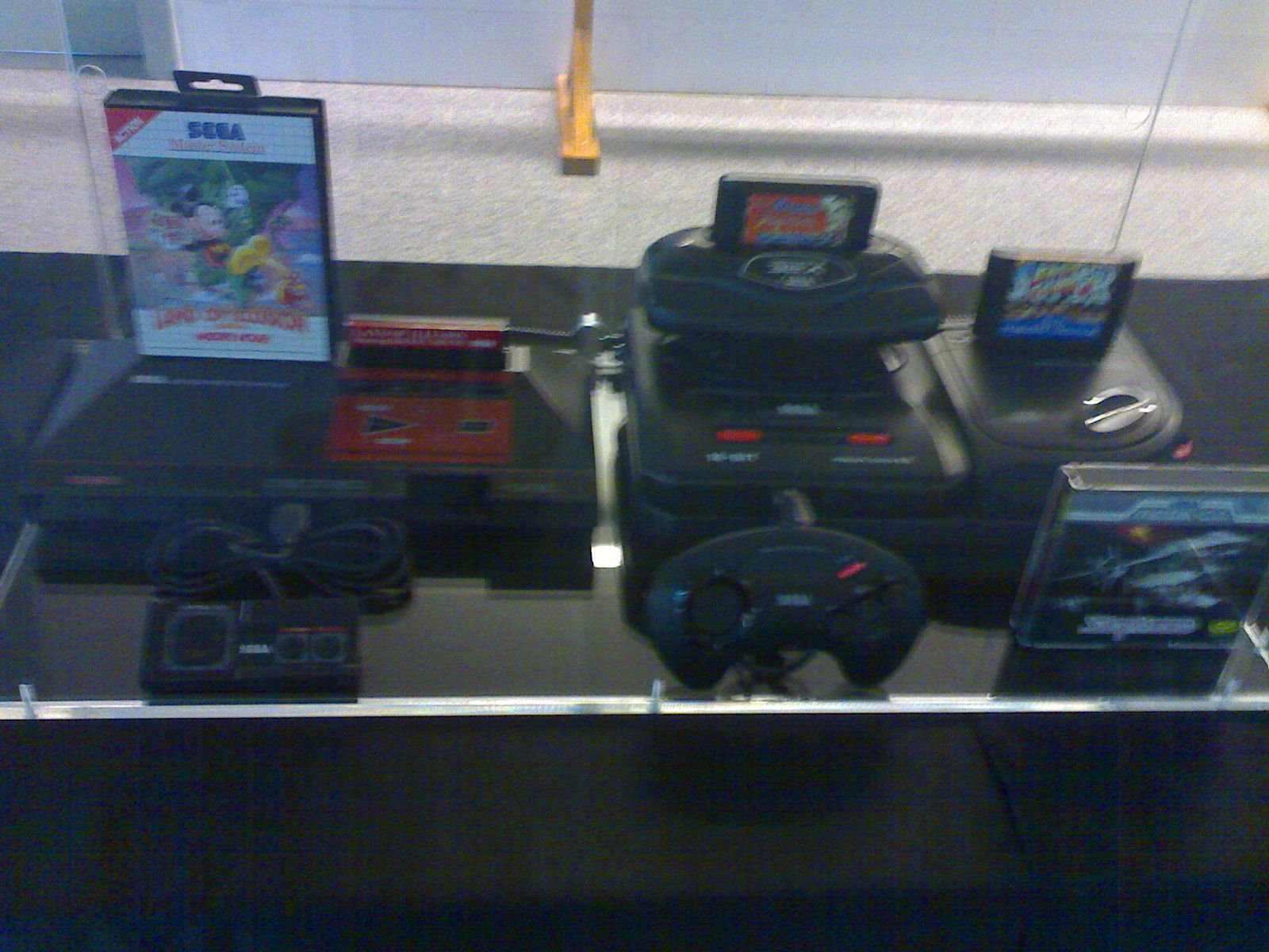 Consolas Sega expuestas en la Semana de la Ingeniería en Zaragoza